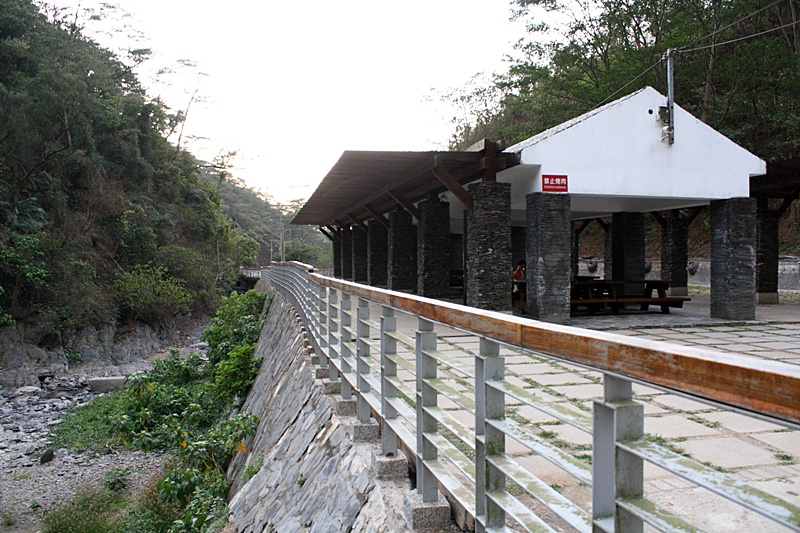 903, Taiwan, 屏東縣瑪家鄉涼山村